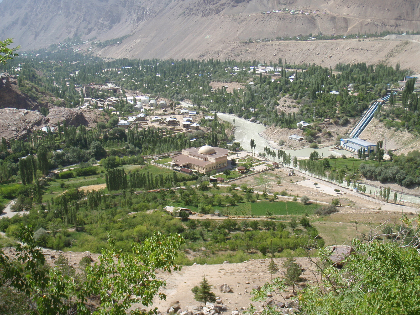 Khorog